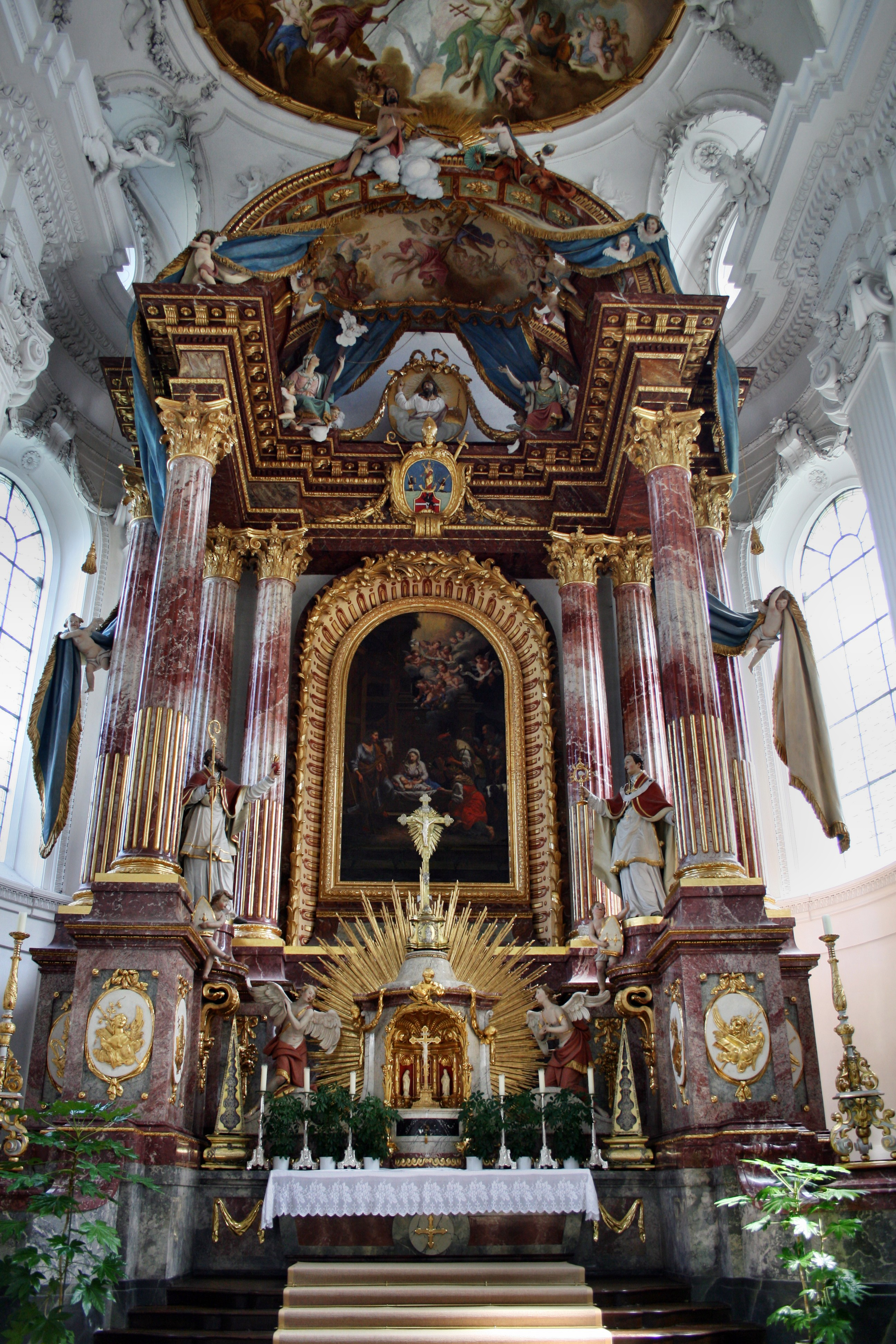 St Verena, Rot an der Rot